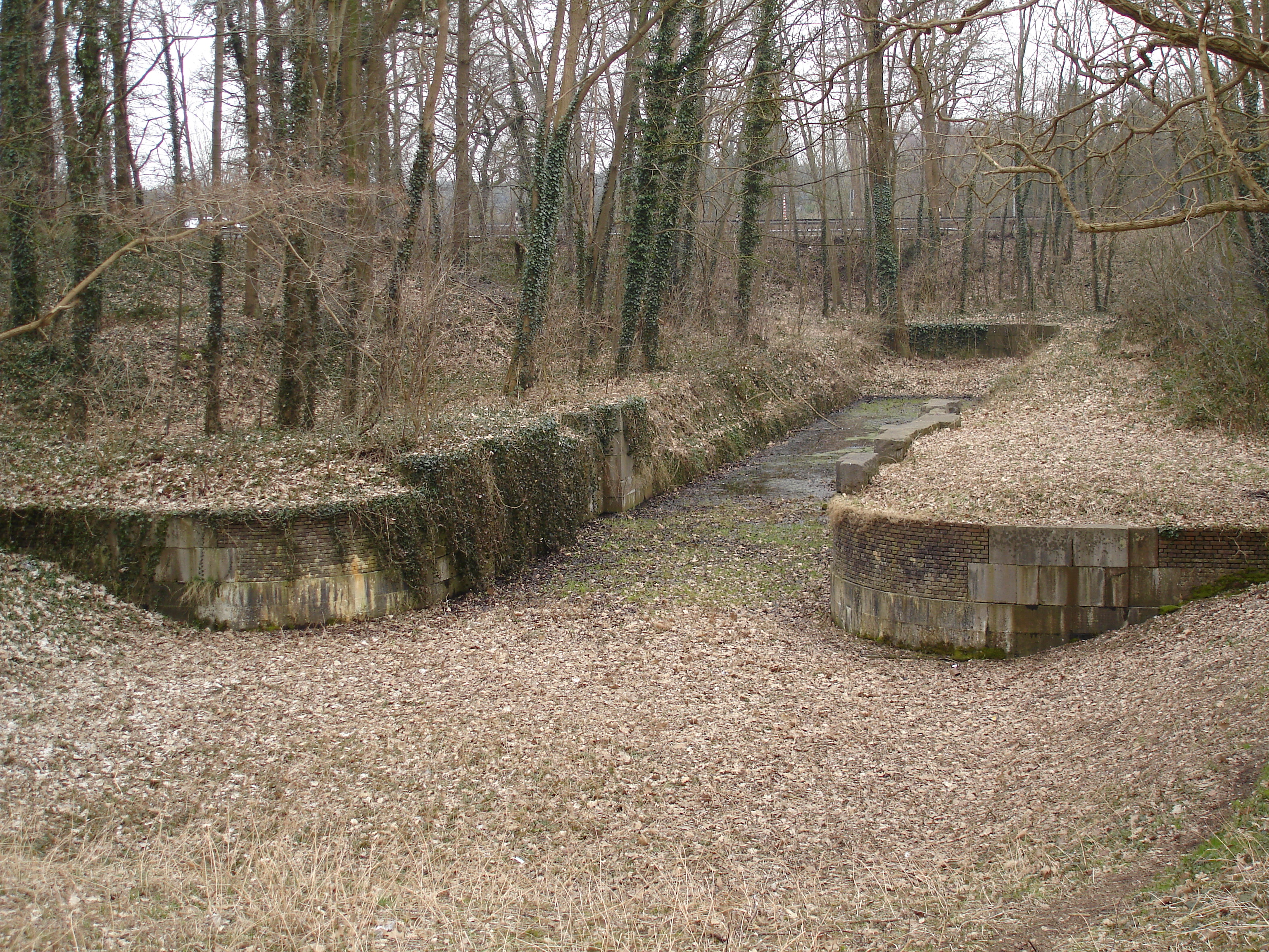 Napoleonische Schleuse des Nordkanal bei Louisenburg